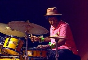 Músico brasileiro Robertinho Silva em imagem do acervo da TV Brasil.